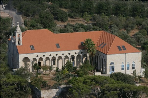 Vue d'Hôpital Saint-Michel d'Amchit